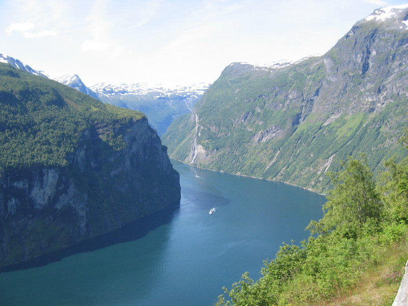 Geirangerfjorden (The Geiranger Fjord)